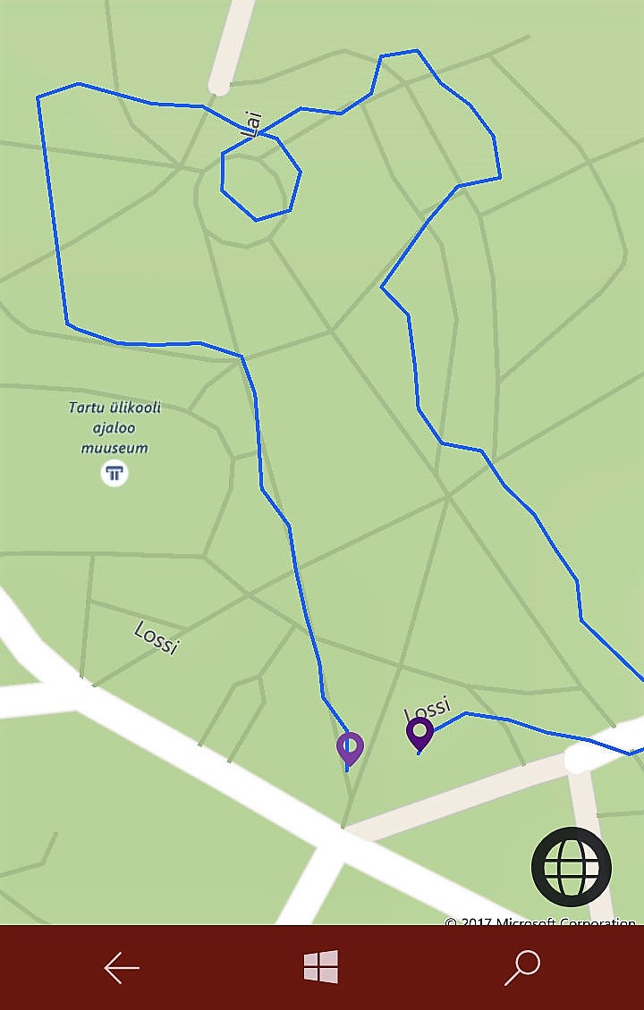 GPS-kunst